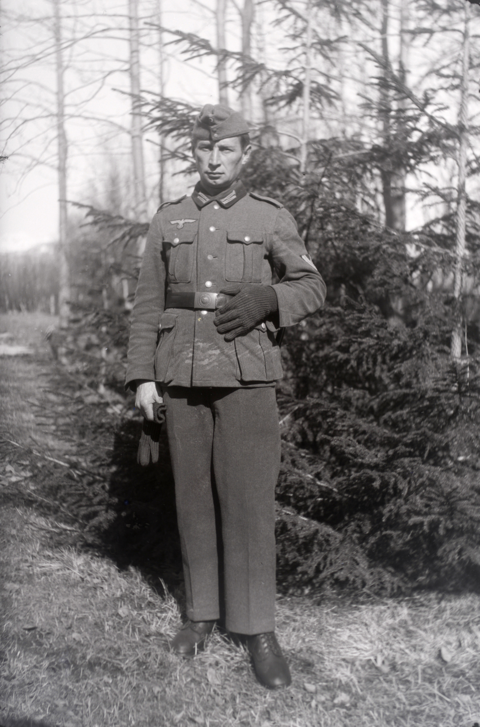 Fotograf: Charles Ravn Avbildet: Fischer